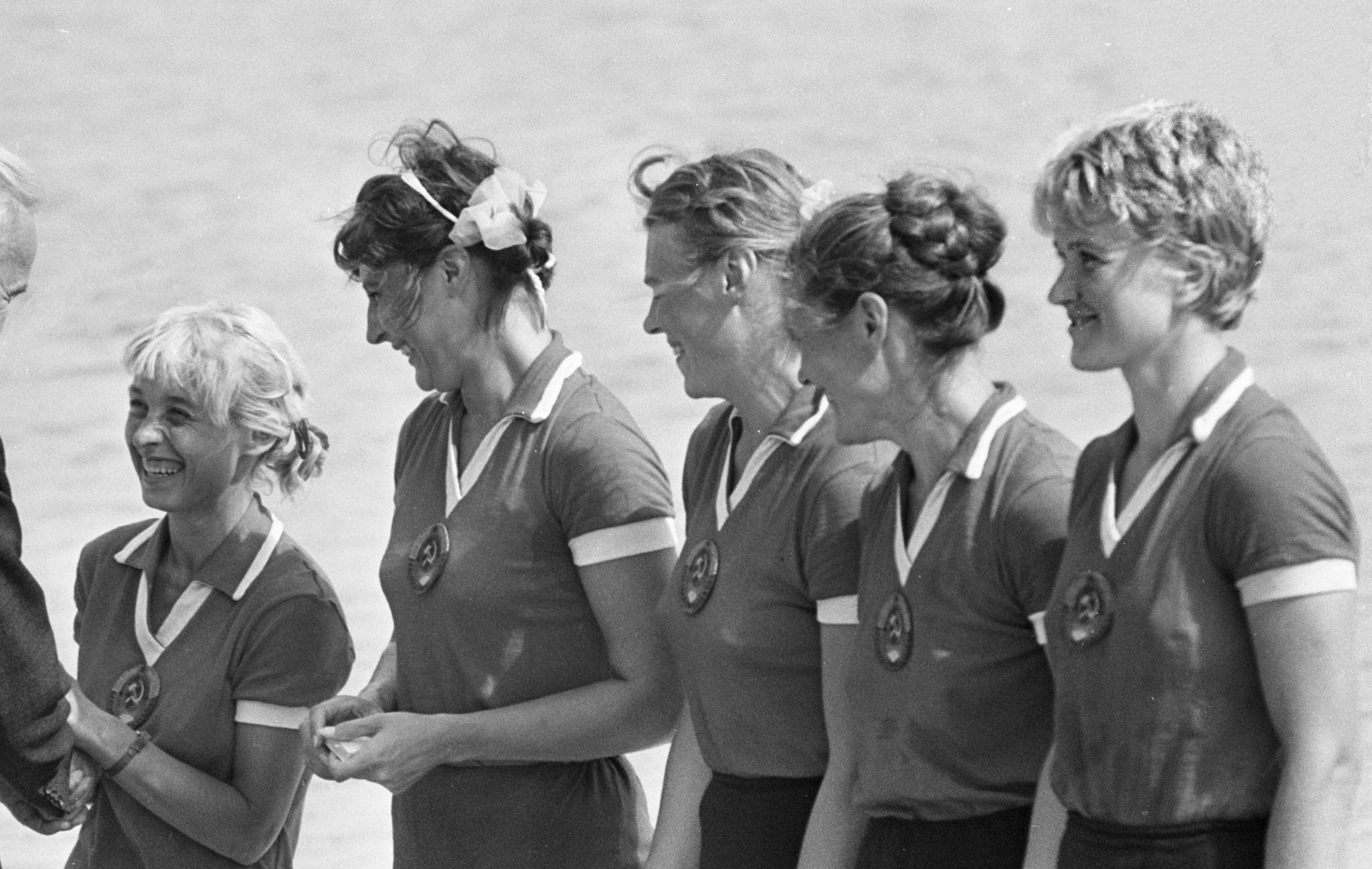 Europese roeikampioenschappen dames Bosbaan, Rusland, Denemarken, Denemarken, Denemarken